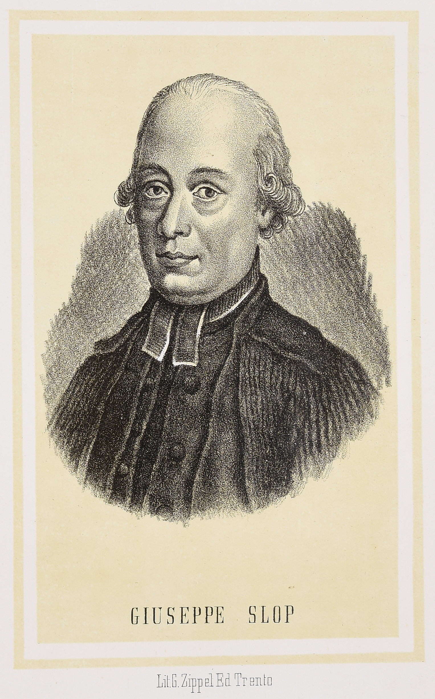 Giuseppe Slop, Trento, Giovanni Zippel, 1883